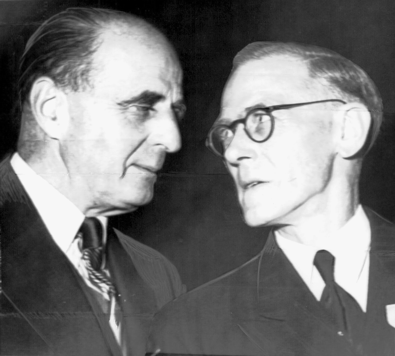 Svensk legering skapade välkänd världsindustri.En tjänsteman och fyra arbetare, det var egentligen hela den arbetsstyrka AB Kanthal hade vid starten 1931. När bolaget på lördagskvällen firade sitt 20-årsjubileum med landshövdingetal och medaljutdelning har arbetsstyrkan vuxit till nära 900, och Kanthal är idag en världsindustri med dotterföretag i USA, Brasilien och Italien.Bilden visar Bruksdisponent Hans von Kantzow som pratar med gjutmästare Oscar Lund, som varit i företaget i 40 år.